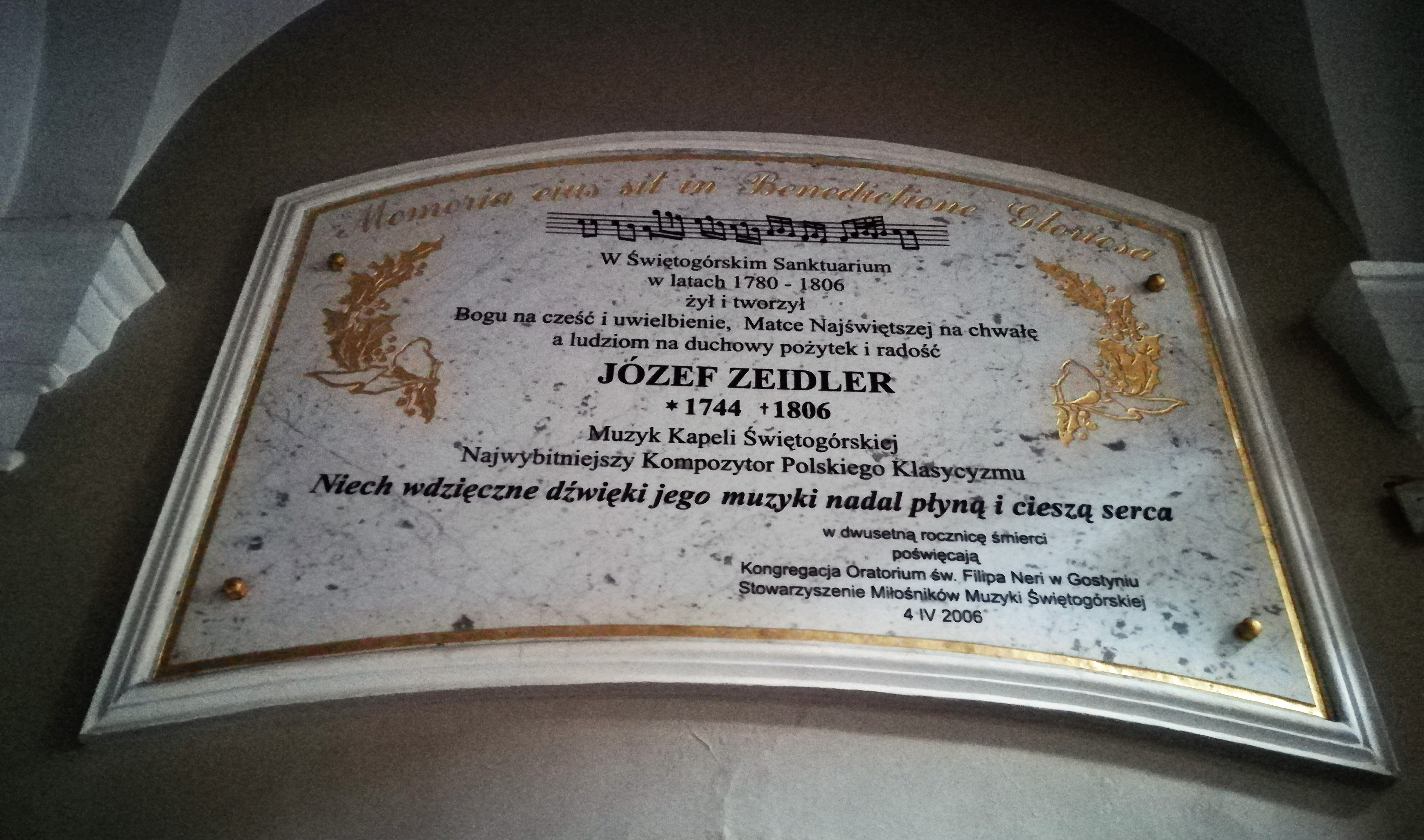 Wnętrze kościoła - Święta Góra, Gostyń.